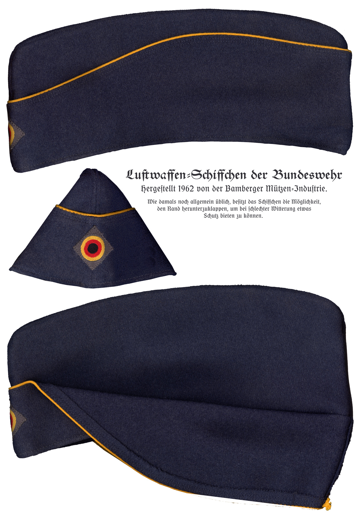 Schiffchen der deutschen Luftwaffe von 1962 (German Air Force field cap from 1962)